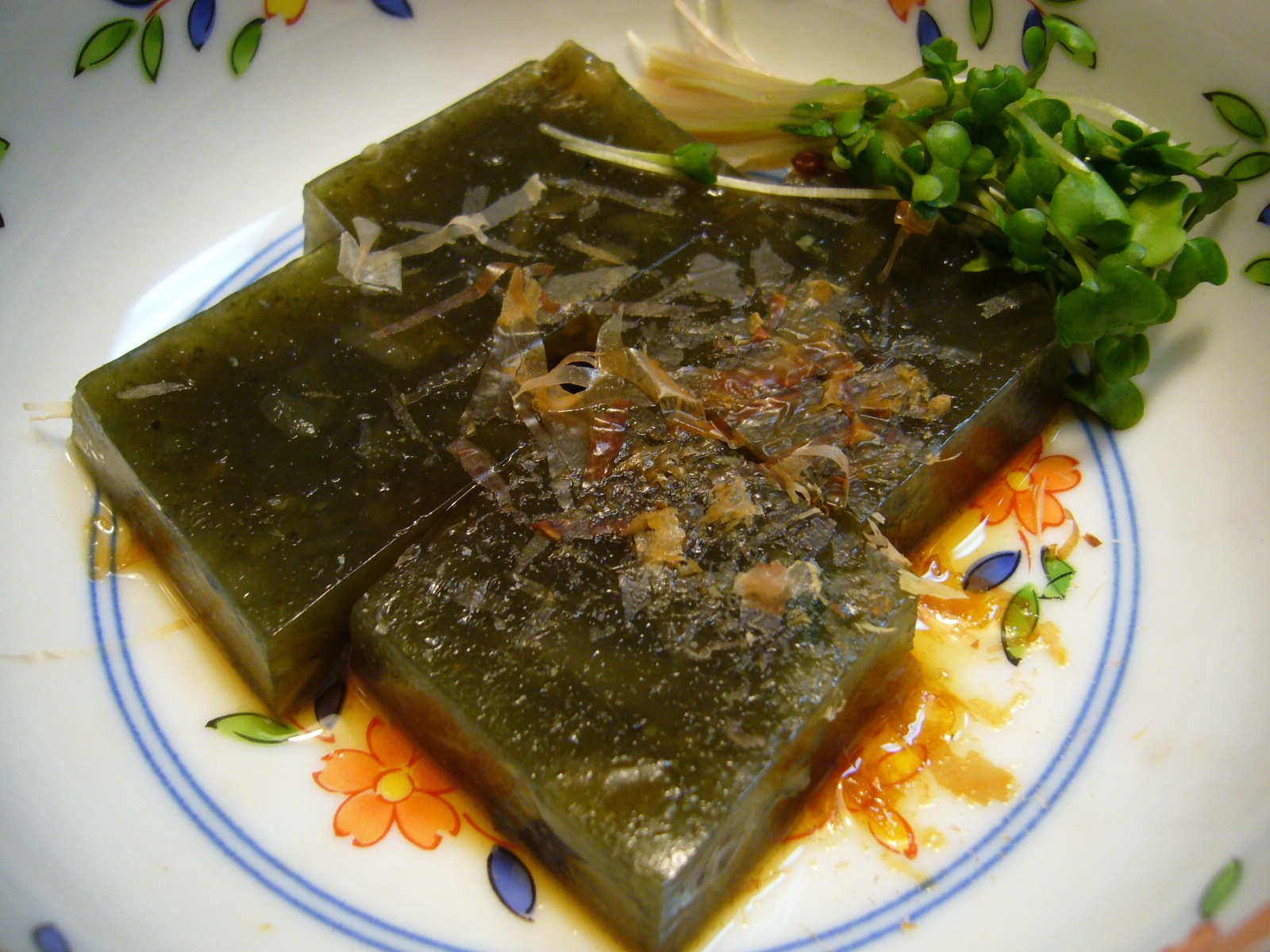 Seaweed-dish,kaisou,katori-city,japan